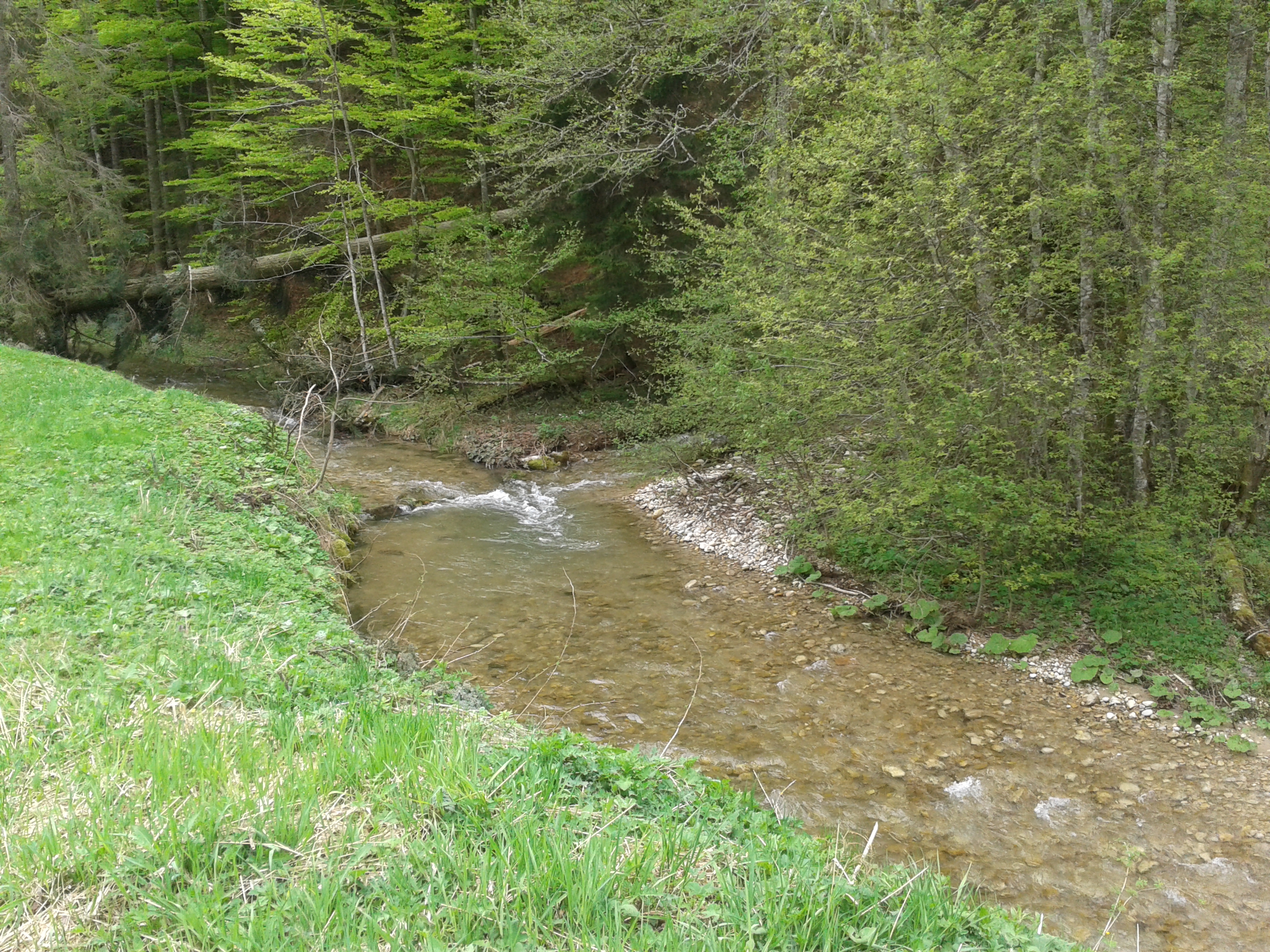 Kürnach im Oberallgäu, Zusammenfluss mit der Großen Goldach bei Oberkürnach